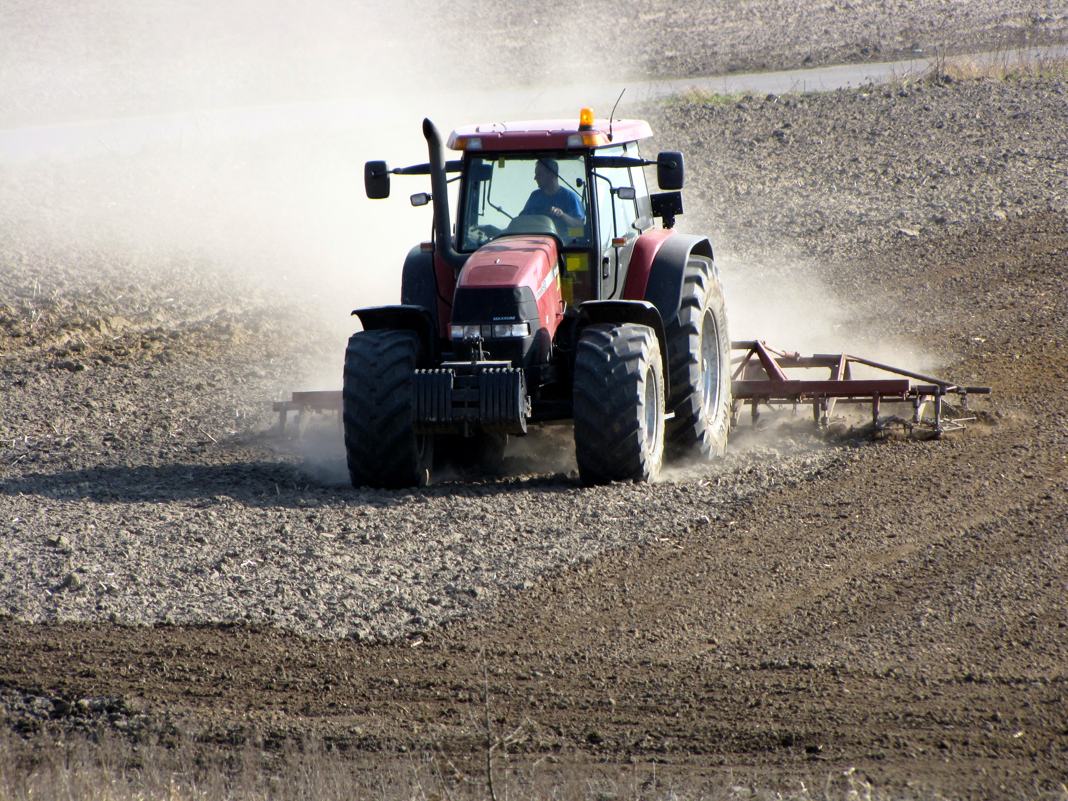 Bronowanie pola